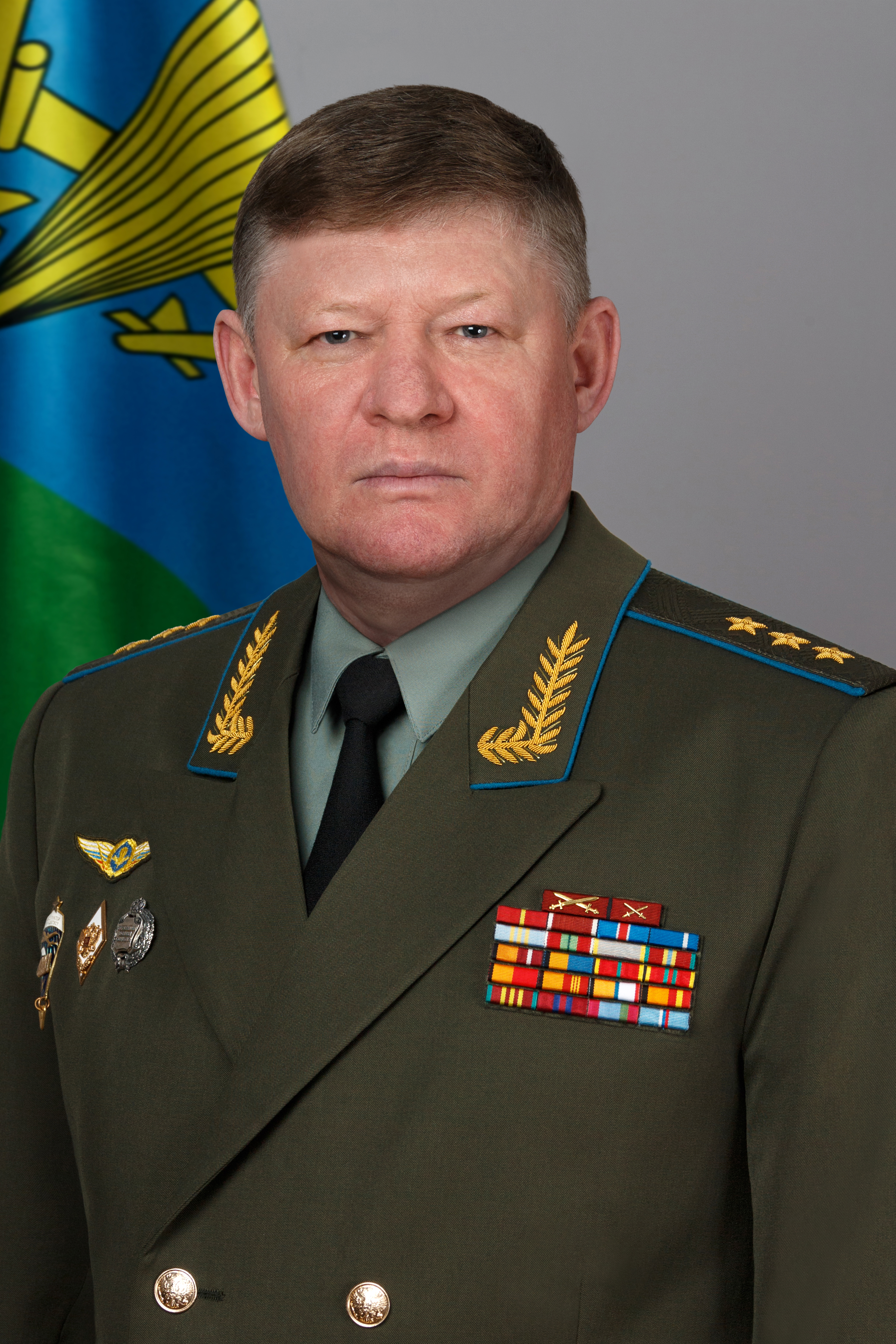 Командующий Воздушно-десантными войсками Российской Федерации генерал-полковник Сердюков Андрей Николаевич